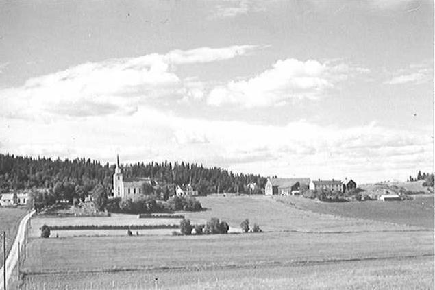 Heggstad kyrkje